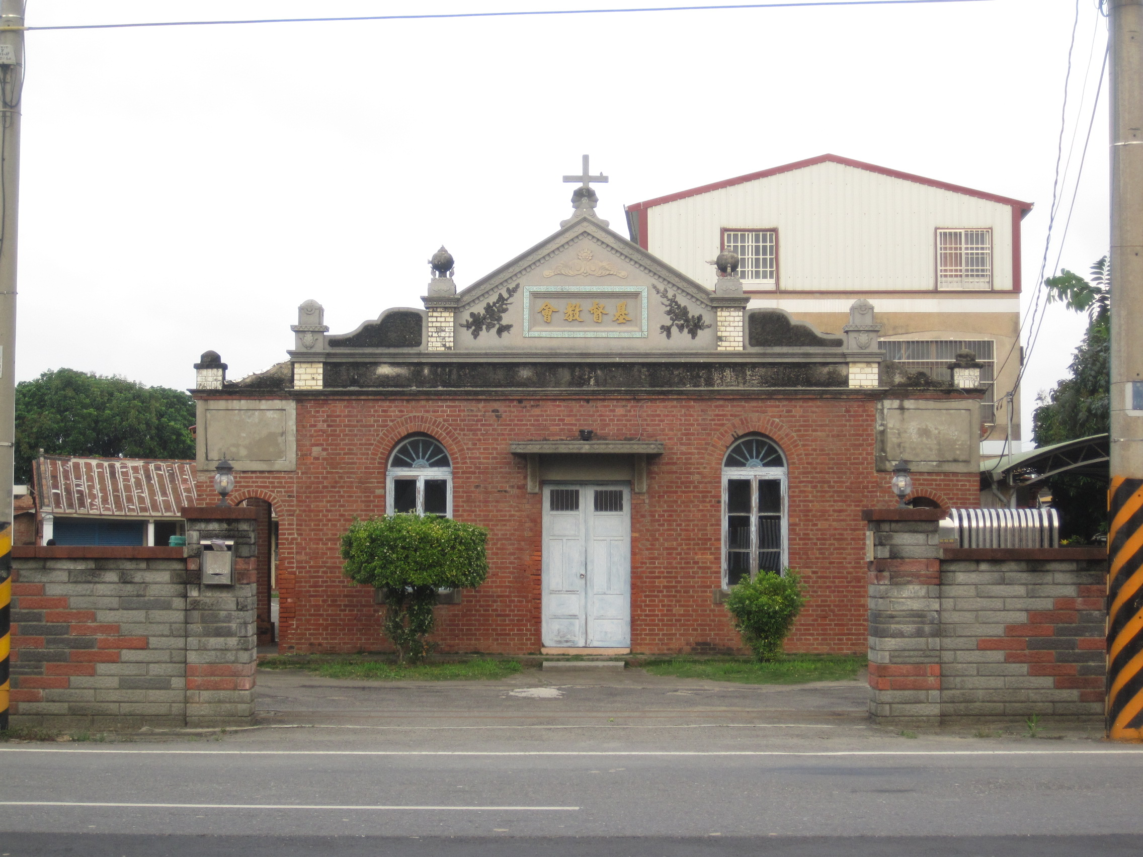 義竹東後寮教會